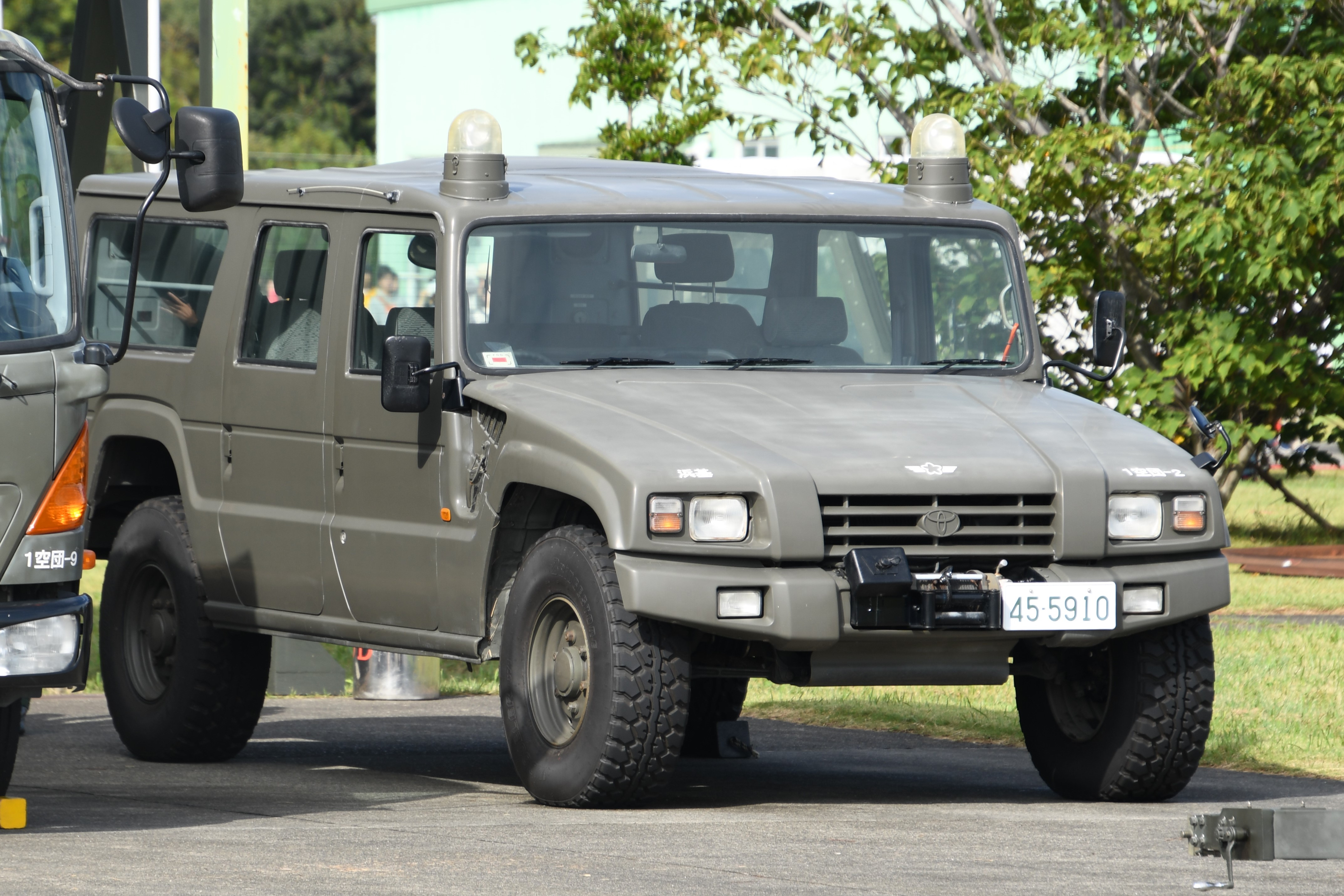 航空自衛隊 場外救難車Ⅰ型（トヨタ・メガクルーザー、45-5910号車） 右前面。2019年10月20日 浜松基地にて。